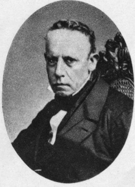 Porträtfotografie von Paul Pfizer.